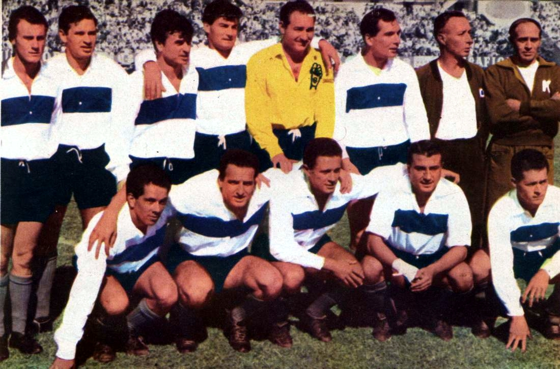 Formación del Gimnasia y Esgrima La Plata campeón de la Copa Alende de 1960